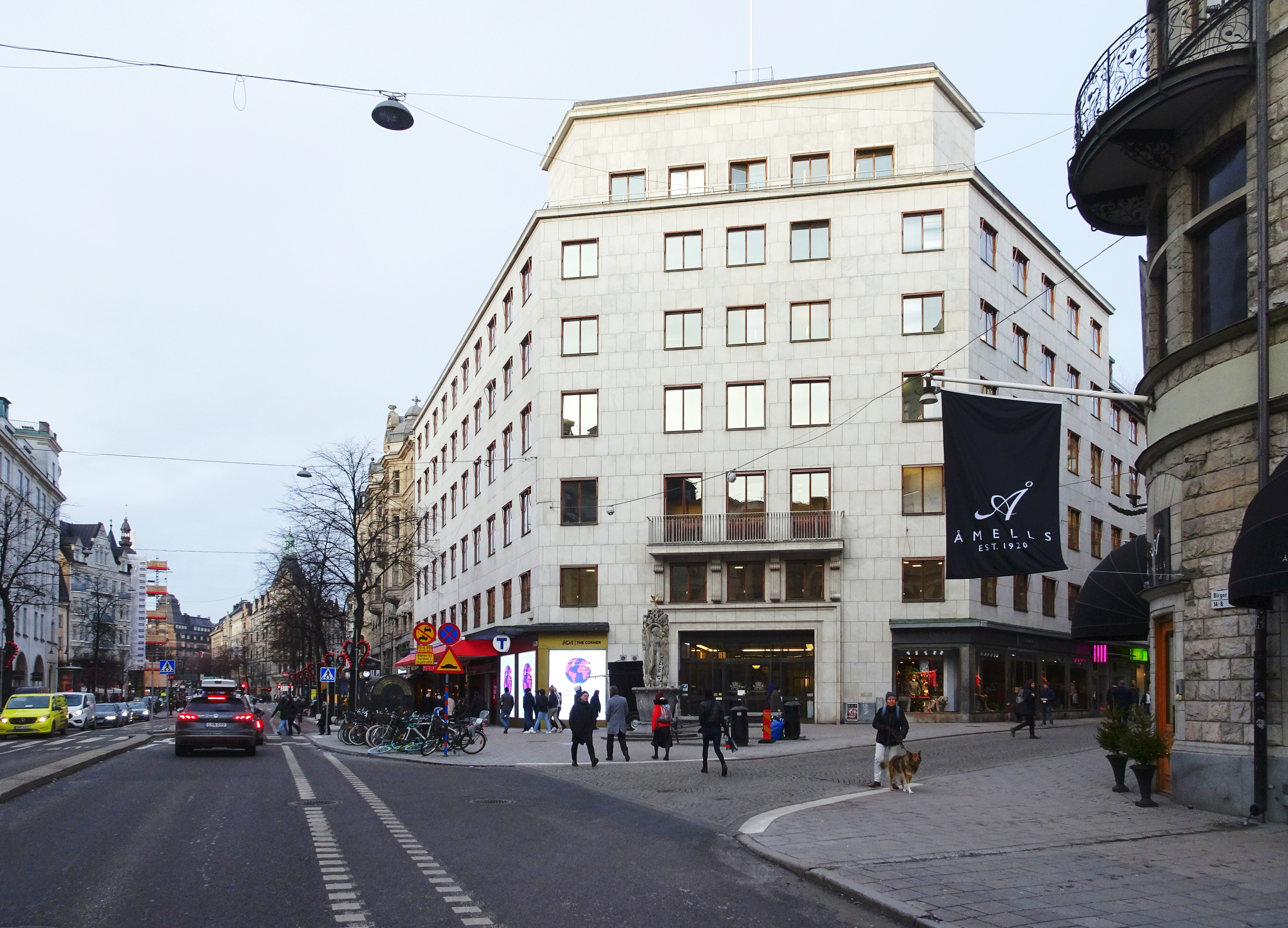 Birger Jarlsgatan 16A, Grev Turegatan 1. Nybyggnadsår 1935, Gustaf Clason (Arkitekt). Städernas Allmänna Brandstodsbolag (Byggherre). Zetterberg AB (Byggmästare)